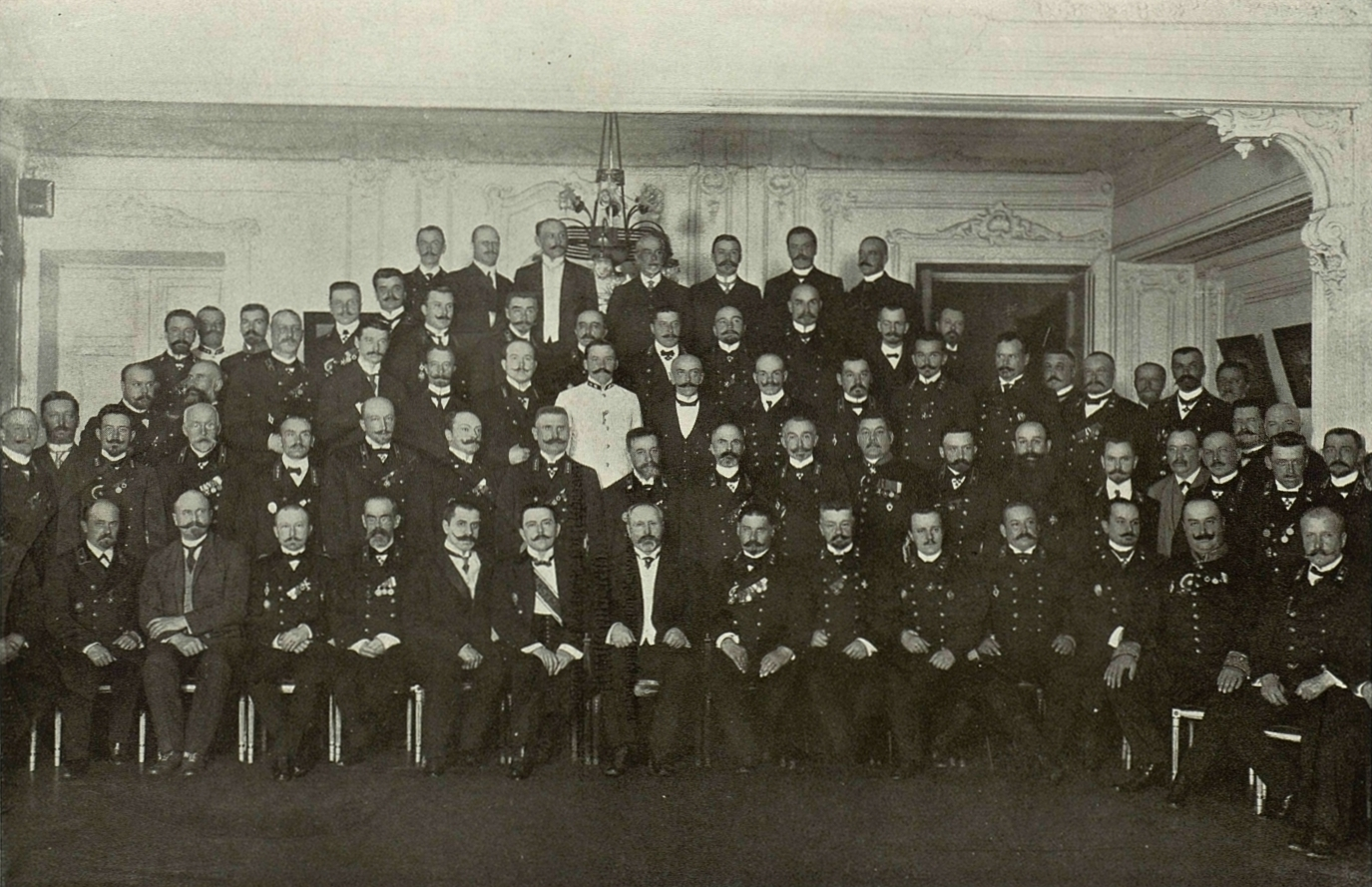 Съезд землеустроительных чинов в Петрограде, в мае 1911 года.